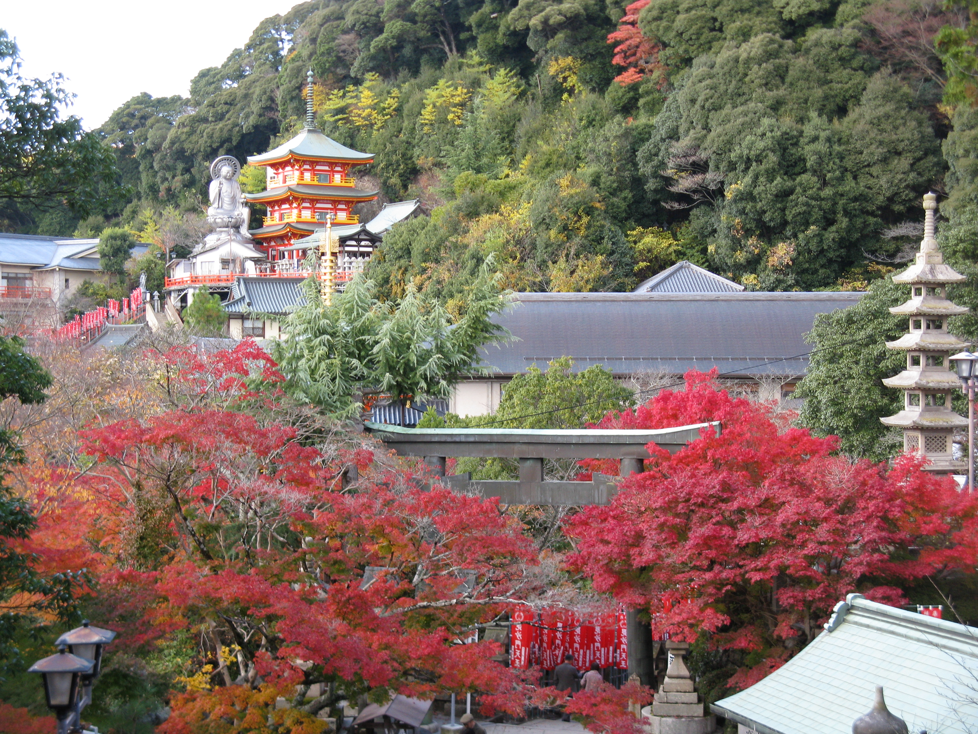 朝護孫子寺